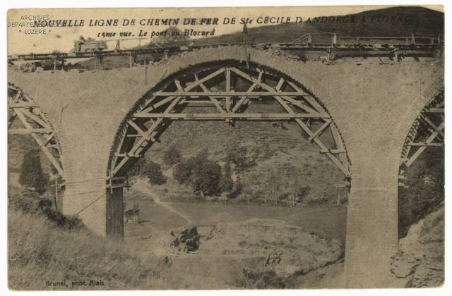 Carte postale de la construction du viaduc du Blocard sur la ligne Florac - Sainte-Cécile-d'Andorge